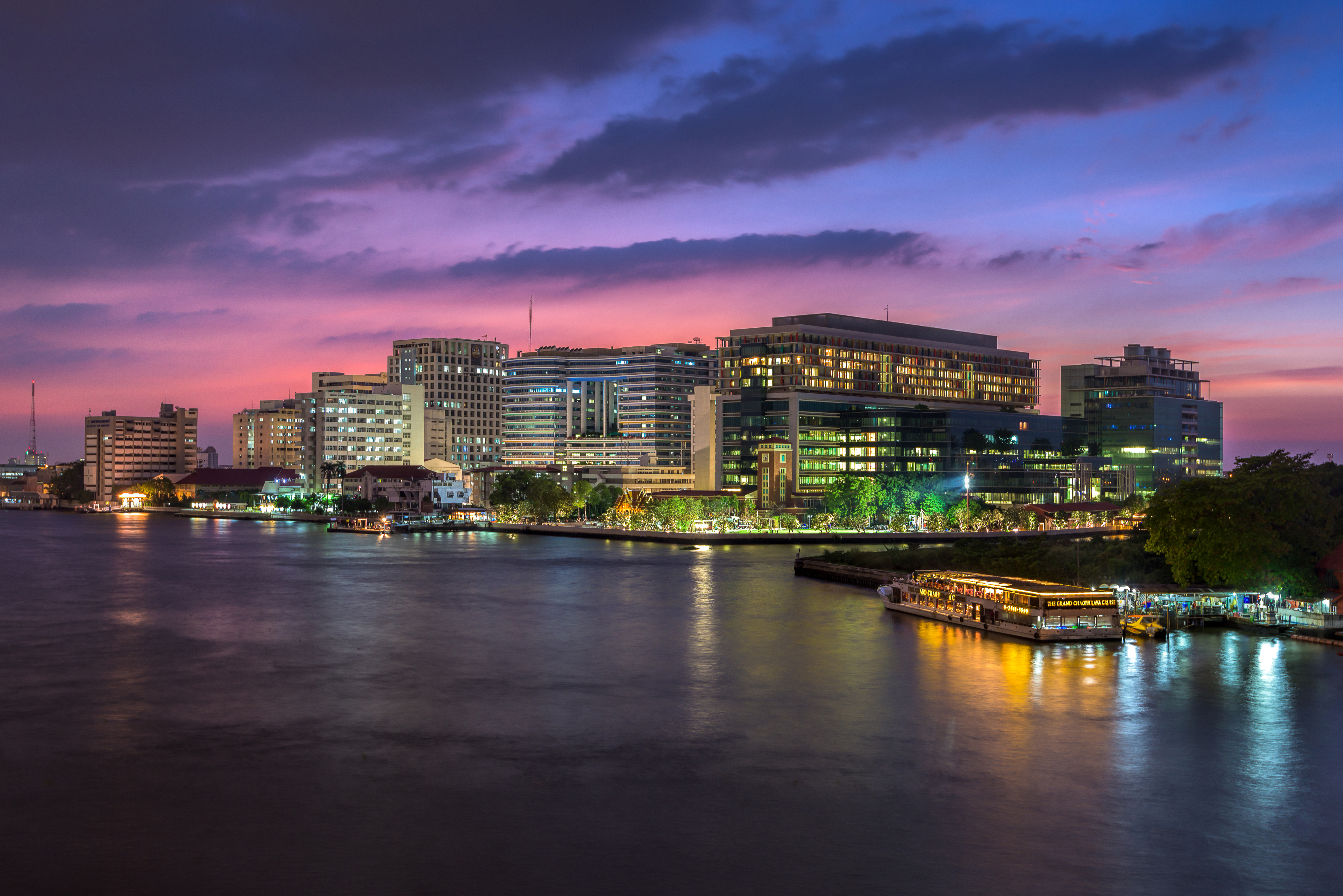 สถานีรถไฟธนบุรี (เดิม)